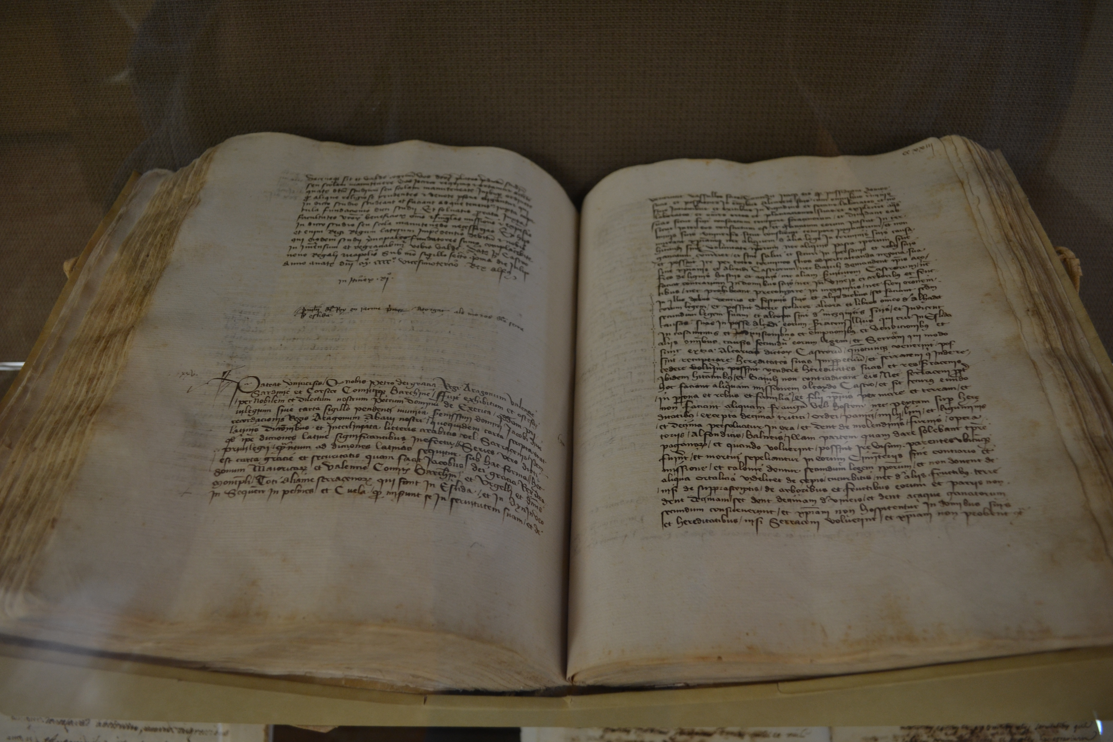 Jaume I concedeix el 20 de maig de 1242, carta de seguretat i poblament als musulmans de la serra d'Eslida i llocs d'Aín, Veo, Senguer, Palmes i Sueras. ARV:Cancelleria Reial, registre 630, fol. 222 (còpia de 4 de gener de 1342). Arxiu del Regne de València.